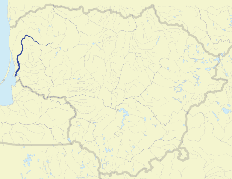 River Minija